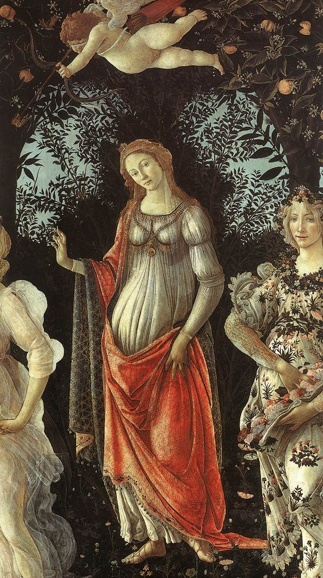 BOTTICELLI, Sandro Primavera Tempera on panel, 203 x 314 cm Galleria degli Uffizi, Florence